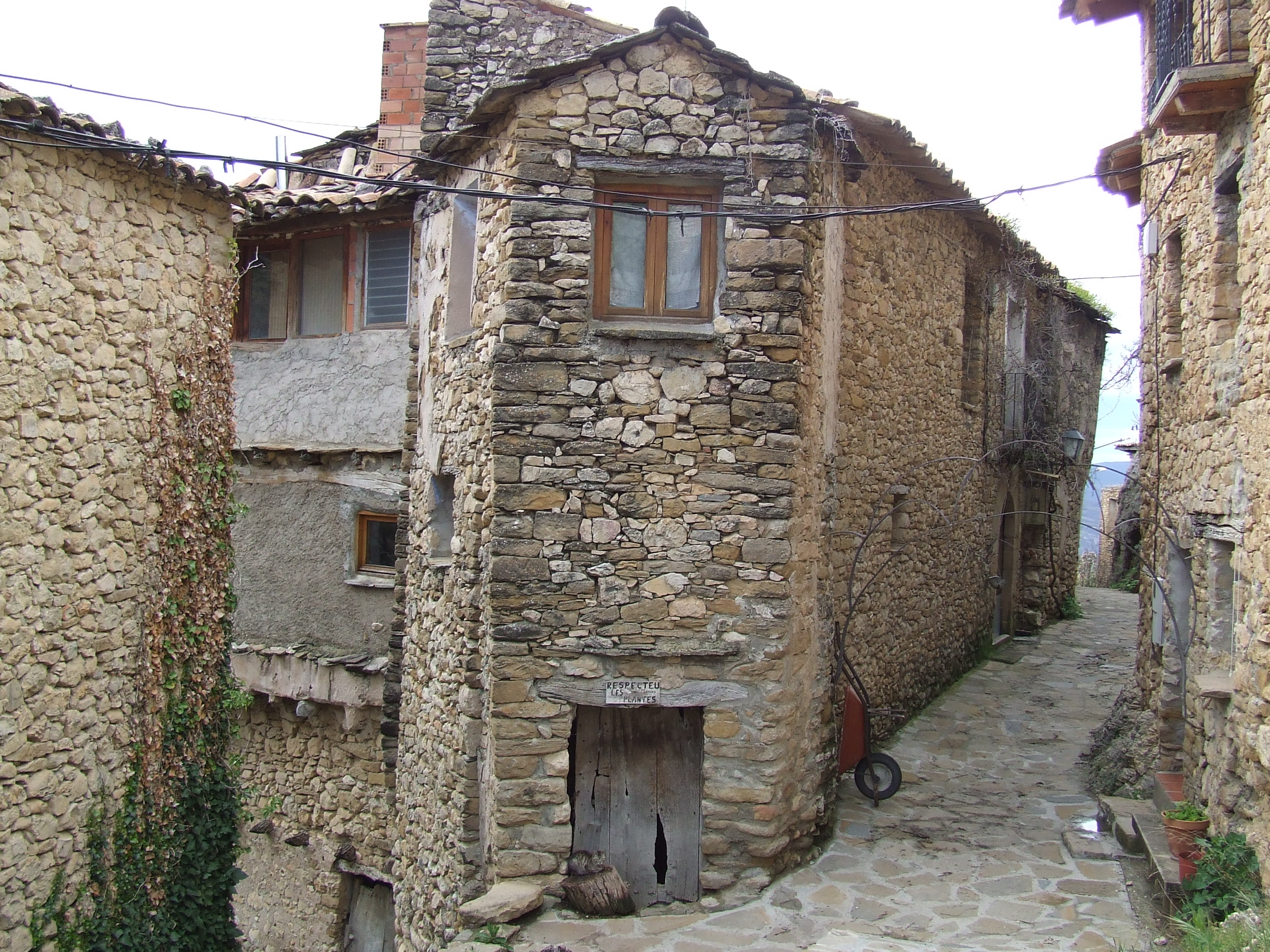 Cases i carrers medievals d'Alsamora (Sant Esteve de la Sarga, Pallars Jussà)